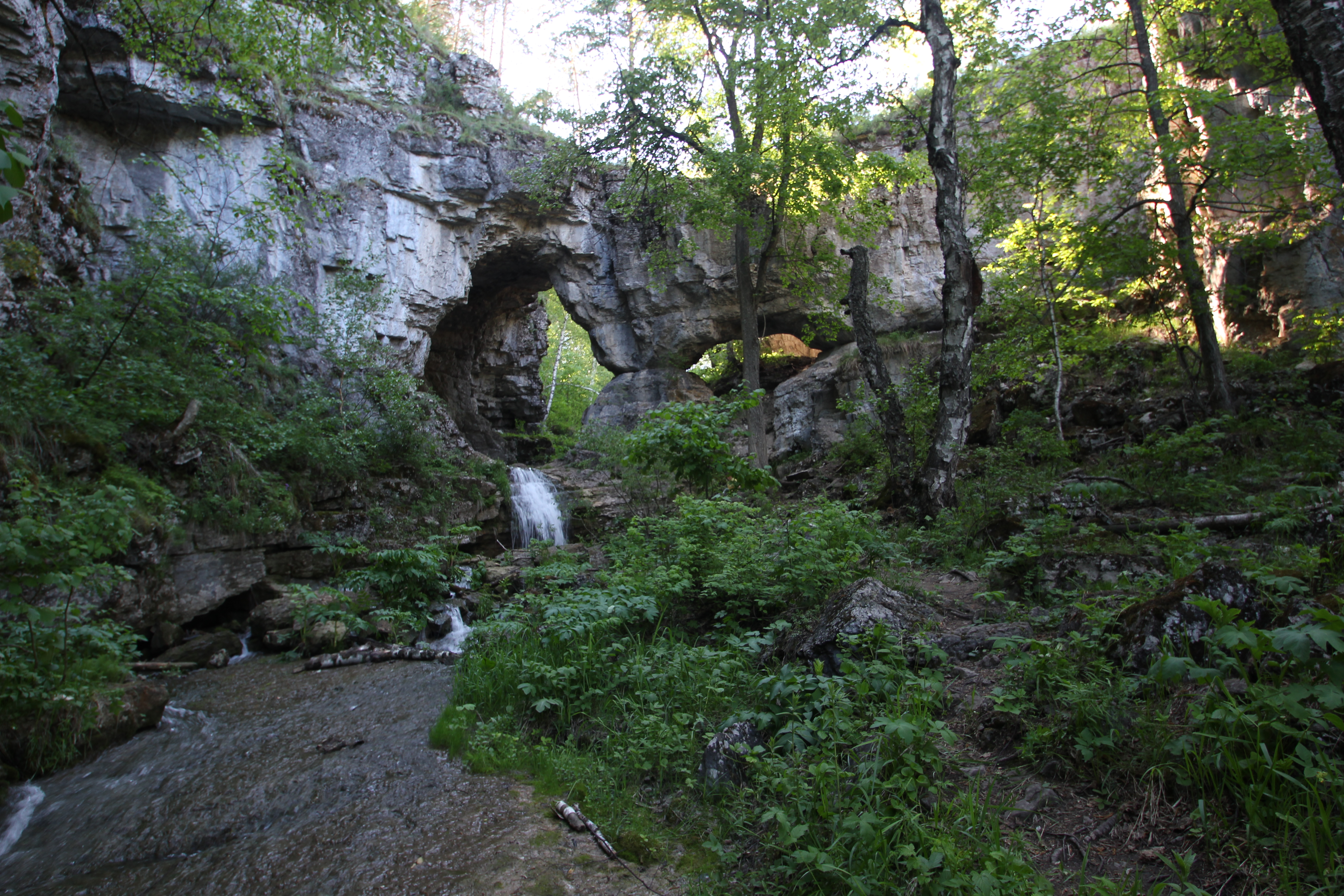 Куперлинский природный карстовый мост, Мелеузовский район This image is related to the protected area of Russia number 0210182